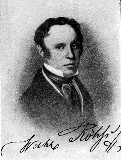 Wilhelm Röhss (1796-1858)